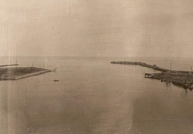 Проход в бухту Очамчыры